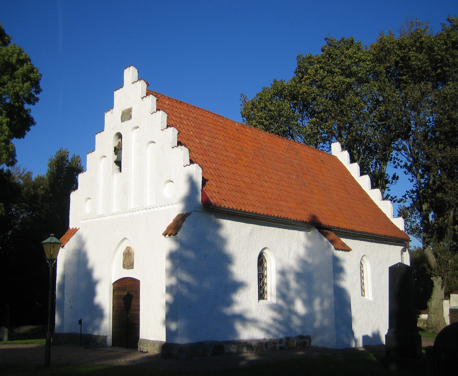 Hyby gamla kyrka, Hyby, Sweden.